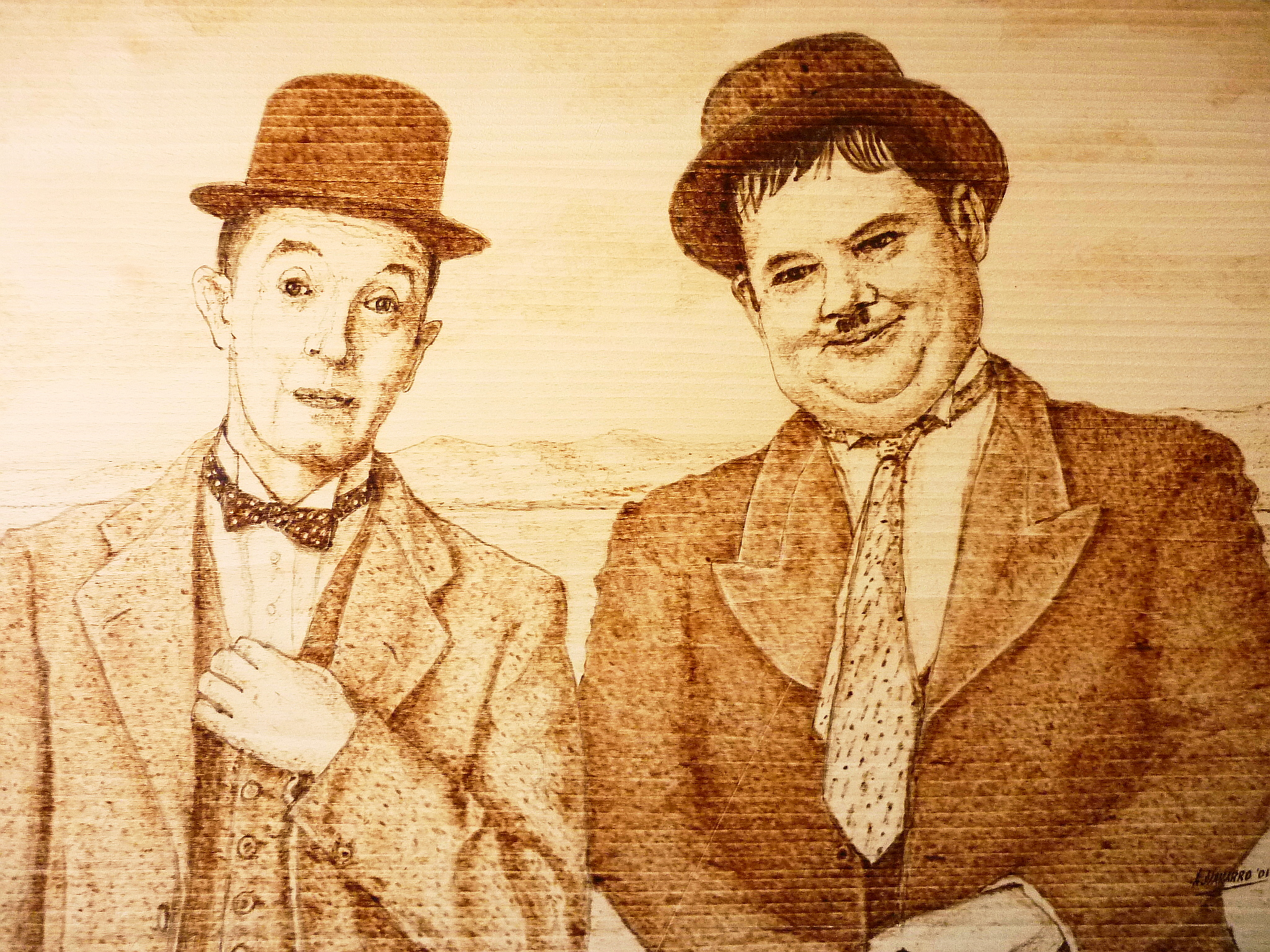 Tabla de ocume de 40x60 cm.